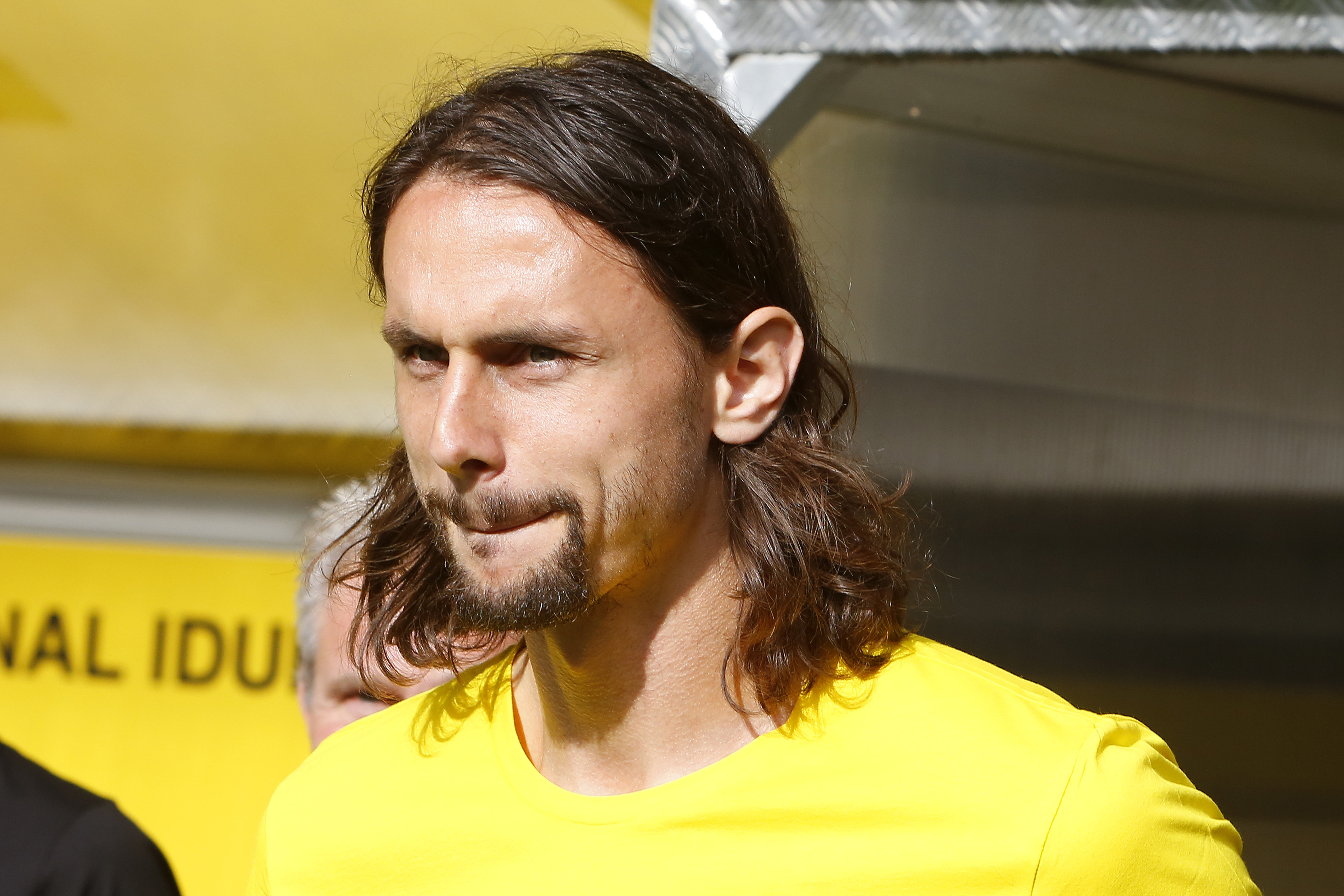 Neven Subotić am 09.08.2014 bei der Mannschaftsvorstellung im Signal Iduna Park in Dortmund